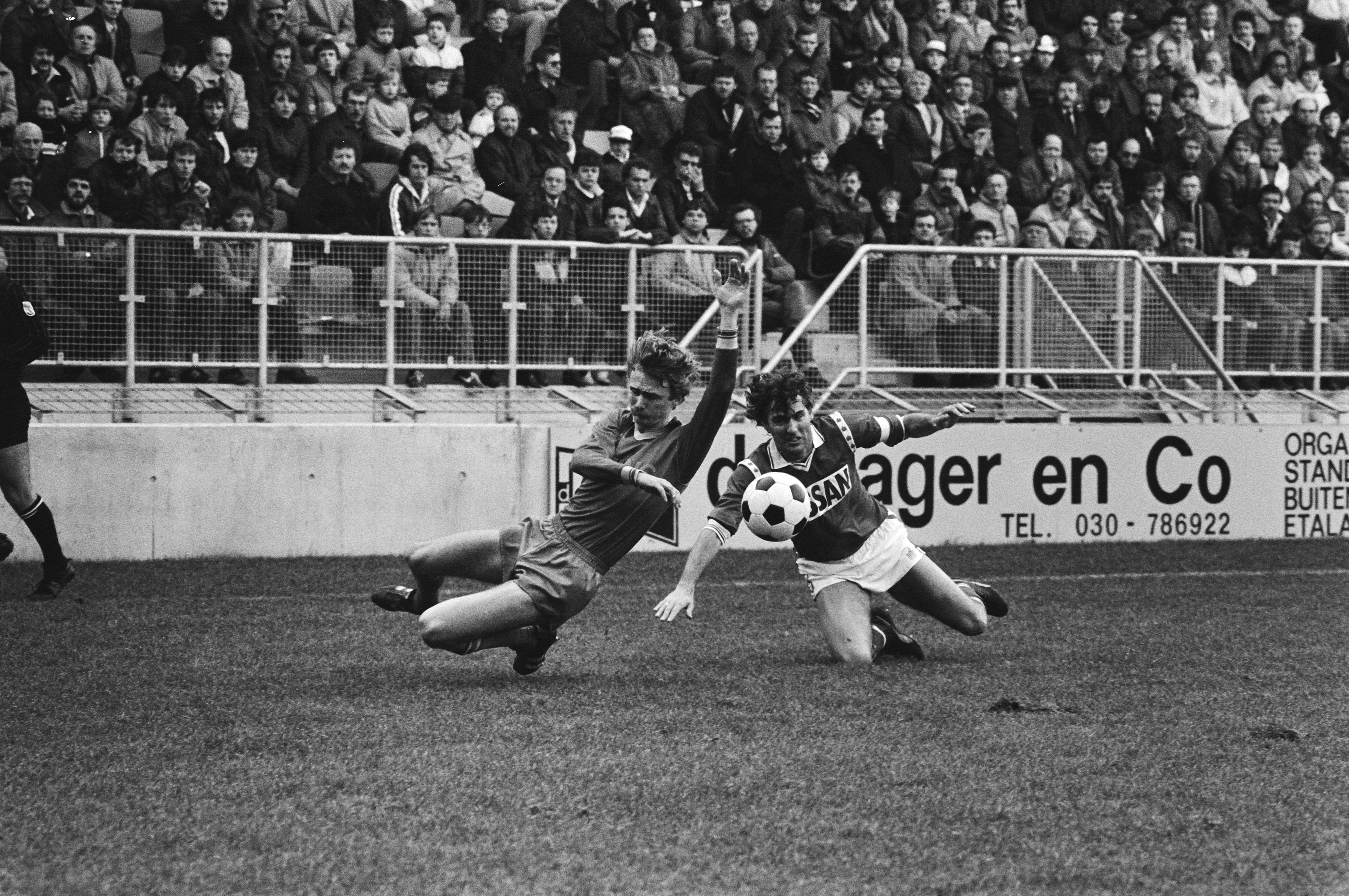 Collectie / Archief : Fotocollectie Anefo Reportage / Serie : FC Utrecht tegen Sparta 0 - 3 Beschrijving : Gerard van der Lem (FC Utrecht) (r) in duel met Adri van Tiggelen Datum : 16 januari 1983 Locatie : Utrecht (prov), Utrecht (stad) Trefwoorden : sport, voetbalwedstrijden Persoonsnaam : Lem, Gerard van der, Tiggelen, Adri van Instellingsnaam : FC Utrecht Fotograaf : Antonisse, Marcel / Anefo Auteursrechthebbende : Nationaal Archief Materiaalsoort : Negatief (zwart/wit) Nummer archiefinventaris : bekijk toegang 2.24.01.05 Bestanddeelnummer : 932-4668